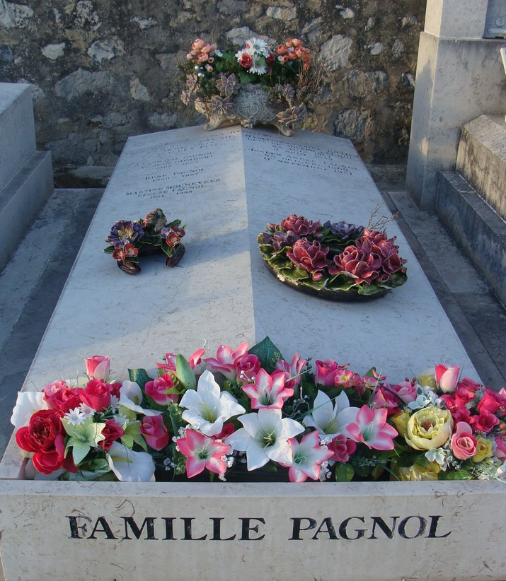 La tombe nommée "Famille Pagnol", au cimetière de la Treille, n'est pas la tombe de Marcel Pagnol, située ailleurs dans le même cimetière.